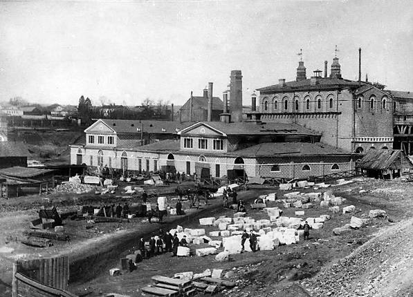 Билимбаевский чугуноплавильный завод под Екатеринбургом, построен в 1734 году